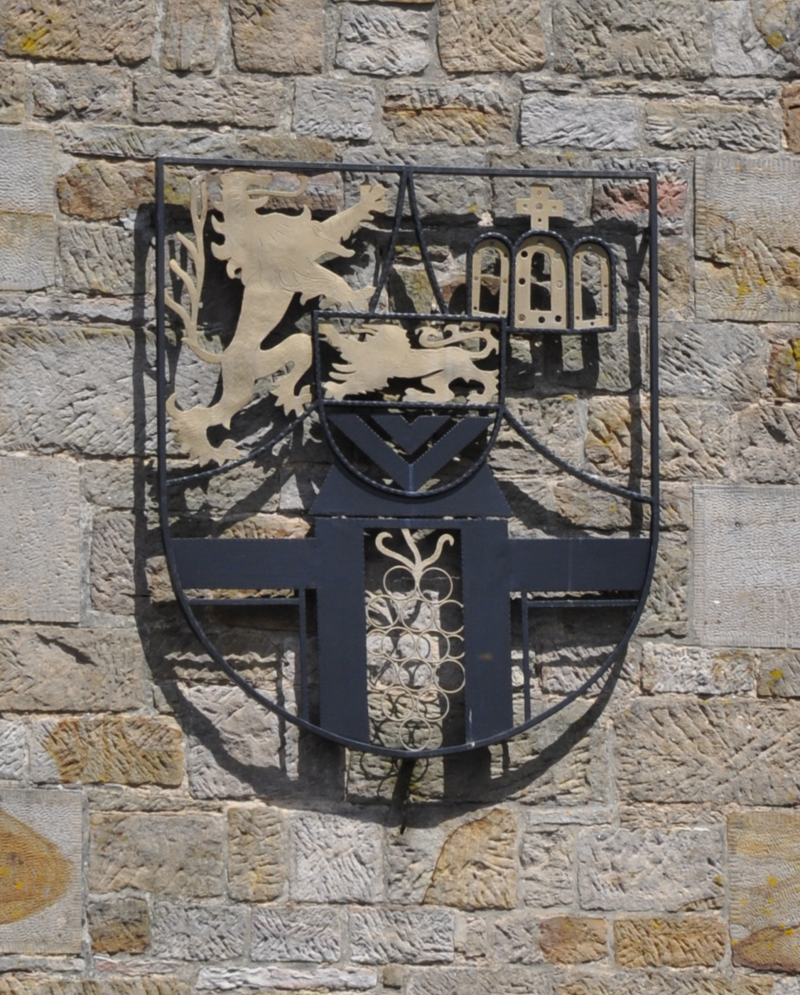 Schweigen, Deutsches Weintor, Wappen des ehem. Landkreises Bergzabern